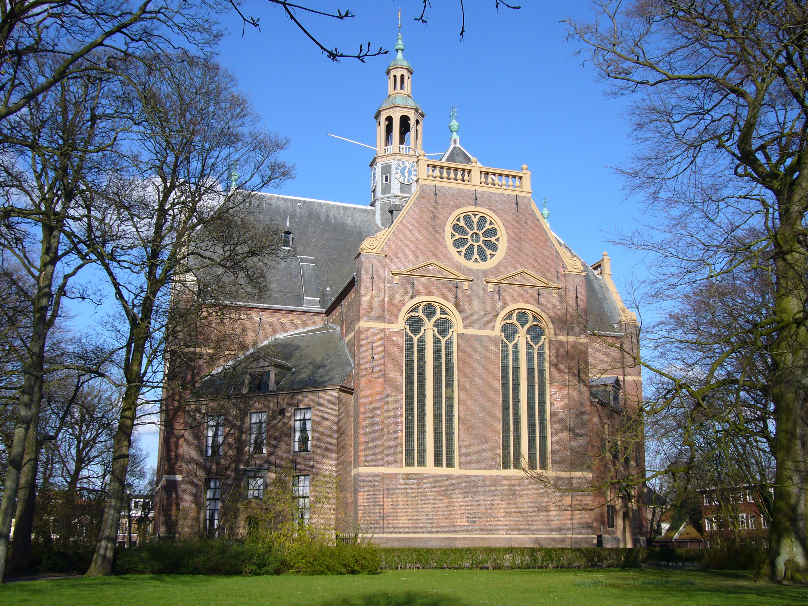 Nieuwe Kerk, Groningen